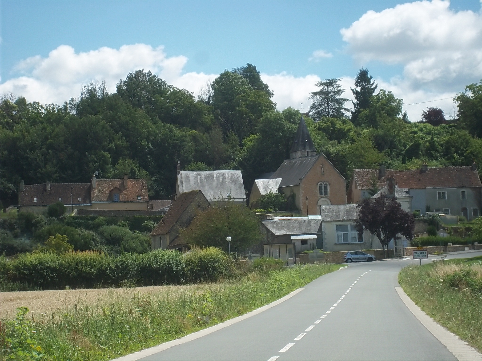 Vouvray sur huisne - Sarthe - le bourg